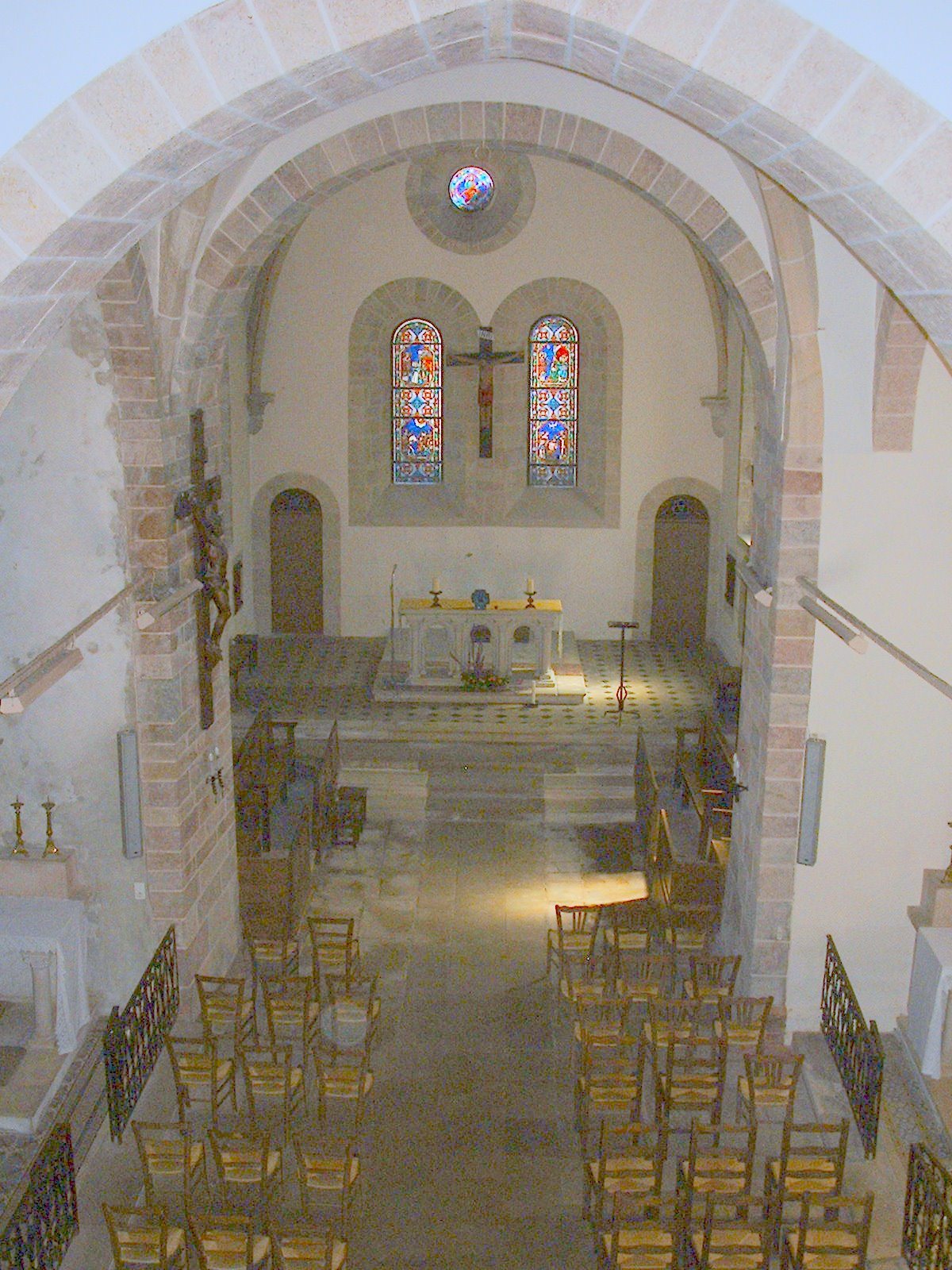 Eglise Saint-Rémi de Guillon (Yonne)